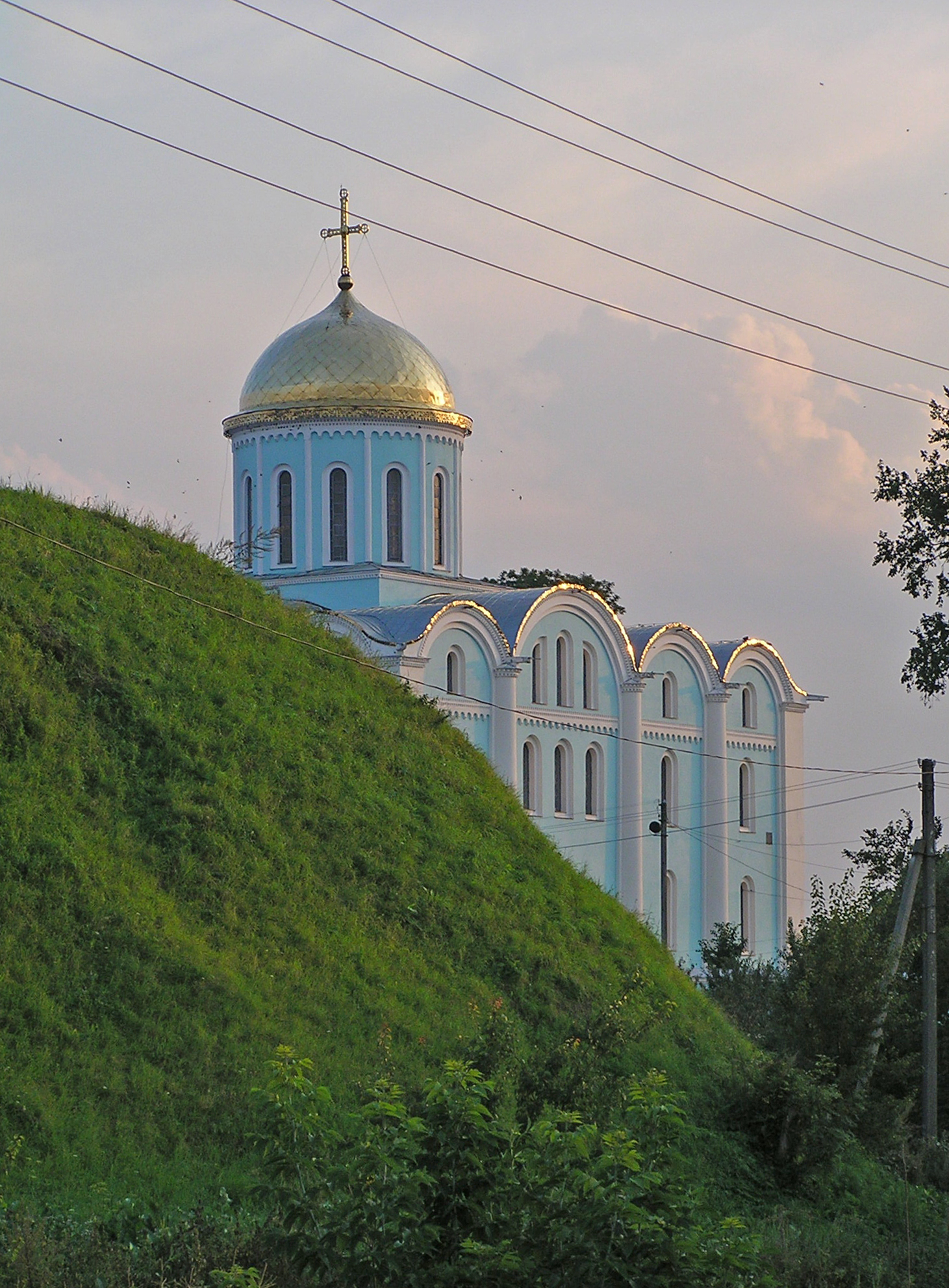 Земляні вали замку 13-14ст., м.Володимир-Волинський